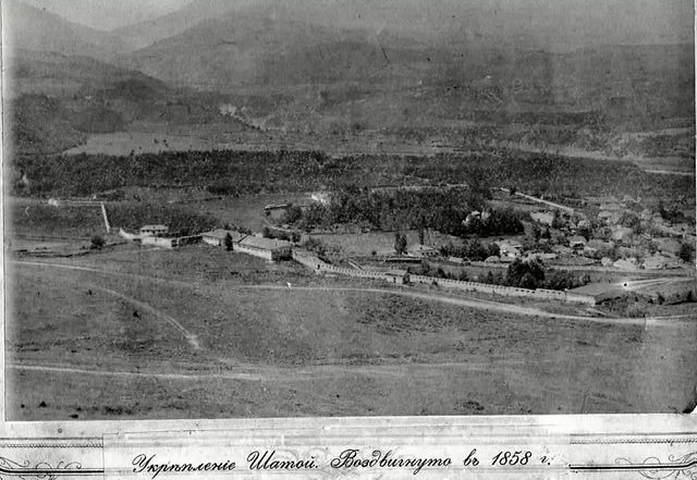 Укрепление Шатой. Воздвигнуто в 1858 году на оккупированных землях тайпа Хаккой.